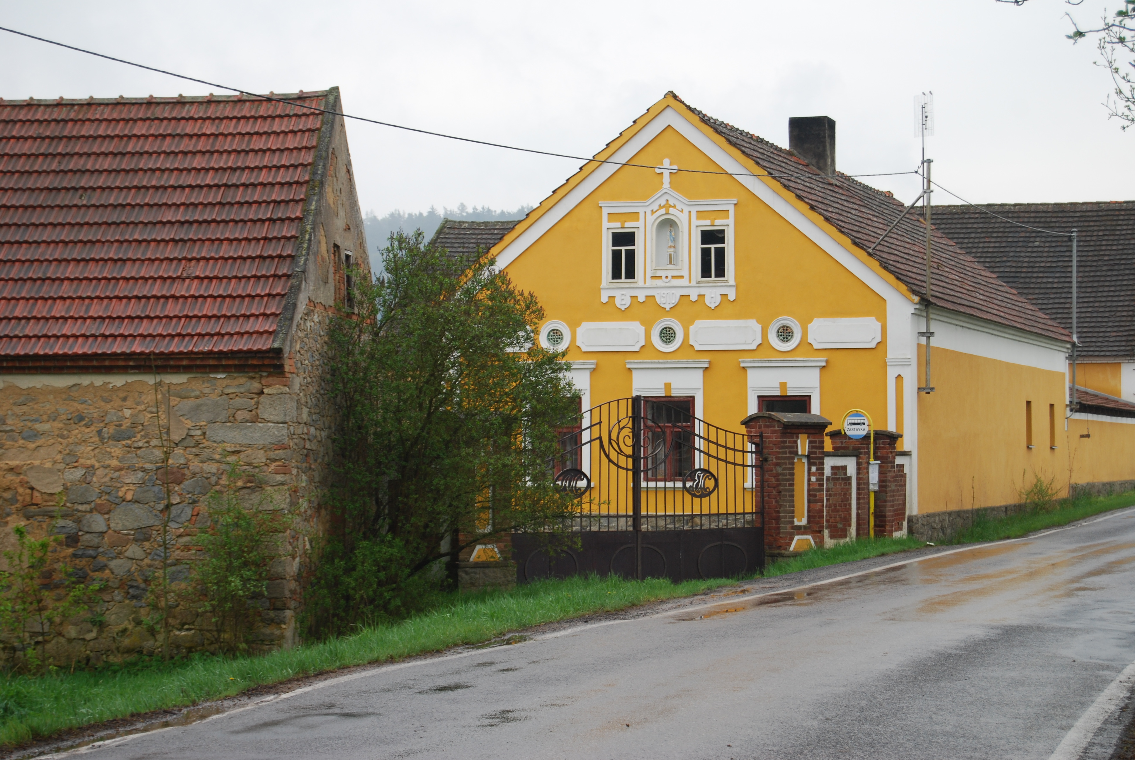 Dům v osadě. Jablonce (dříve též Jablonec) je osada, část obce Nečín v okrese Příbram. Česká republika. - Google Maps - Google Earth